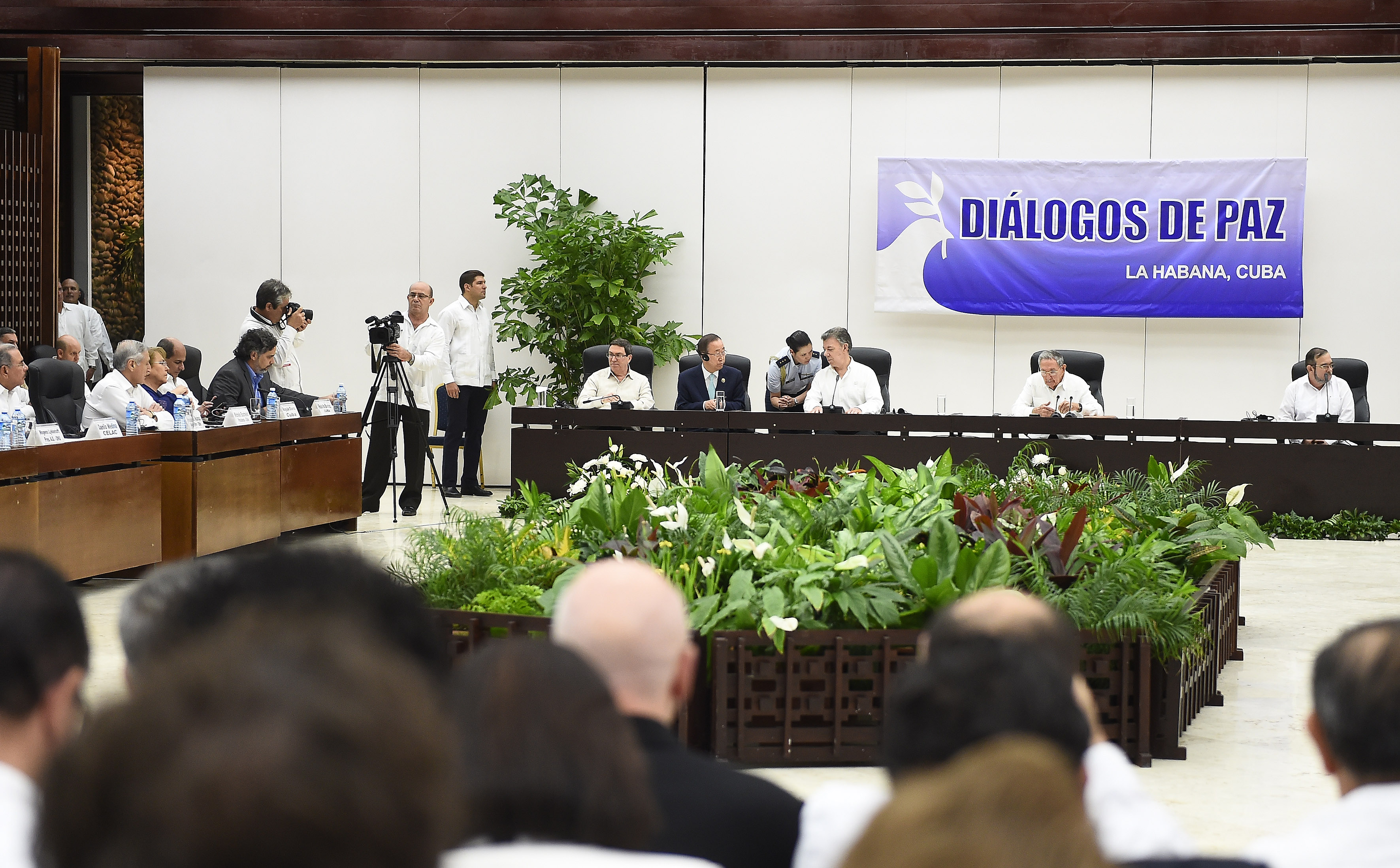 Gobierno de Chile. La Presidenta de Chile Michelle Bachelet participó en la ceremonia de Firma de Cese al Fuego del Diálogo de Paz entre el gobierno Santos y las FARC.